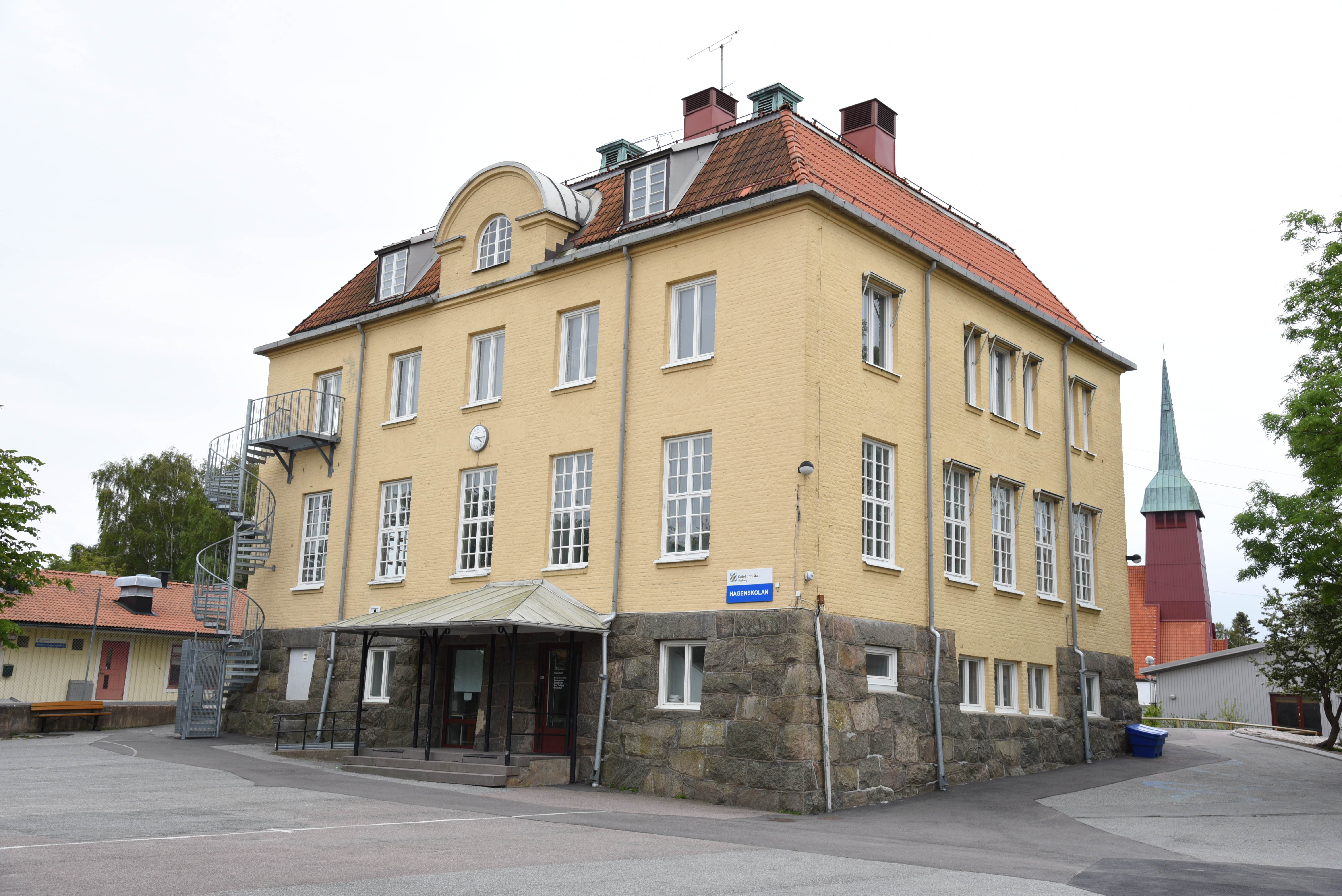 Hagenskolan i stadsdelen Älvsborg i västra Göteborg.